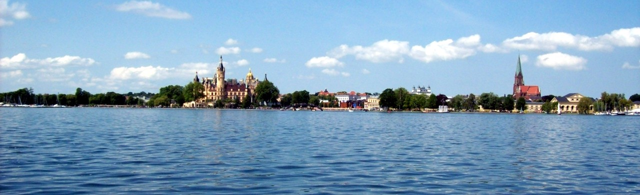 Stadtansicht Schwerin vom Schweriner See